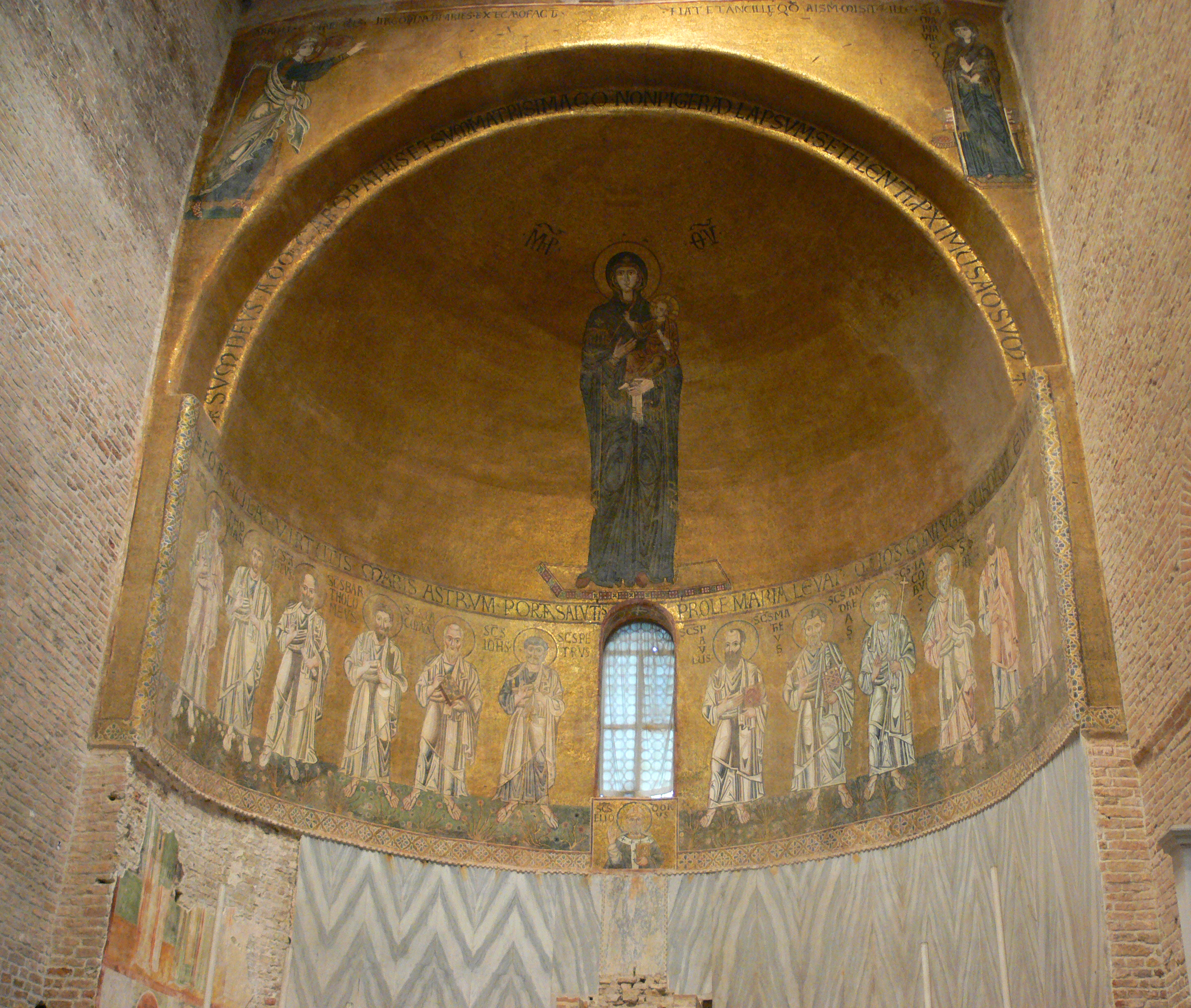 Cathédrale Sante Maria Assunta de Torcello, dans la lagune de Venise